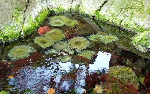 Sala do Oceano Pacífico, Oceanário de Lisboa, Lisboa, Portugal. Junho 2004. João Méndez